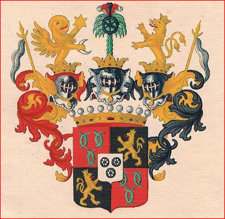 Wappen der von Steinau-Steinrück